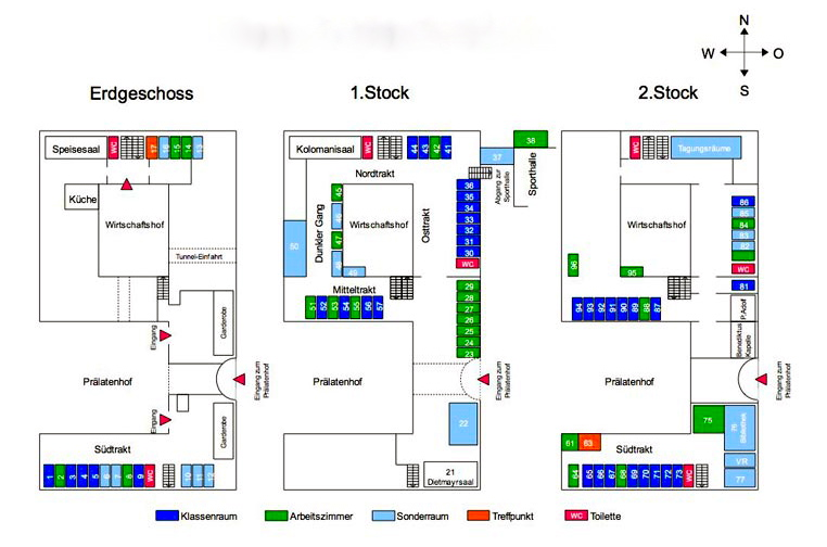 Raumplan des Stiftsgymnasiums Melk